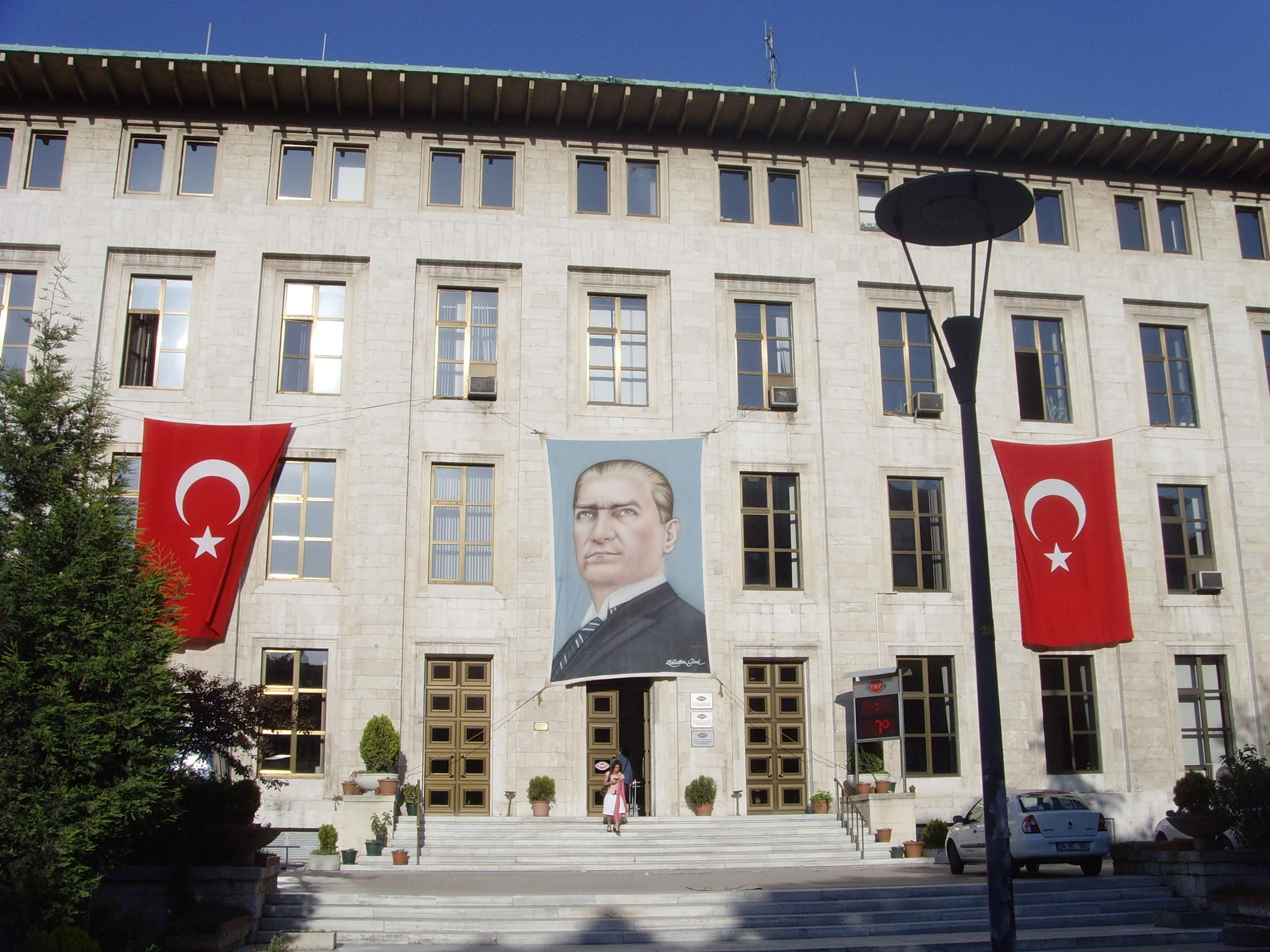 TRT İstanbul Radyosu'nun yer aldığı İstanbul Radyoevi / İstanbul Radiohause - TRT İstanbul Radio